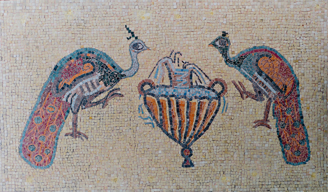 העתק פסיפס הטווסים מהכנסייה הביזנטית בנהריה בשנת 2011 הופקה והוצגה תערוכת צילומים של הפסיפס במרכז 'הקצה' ביוזמת האמנית והאוצרת לי רמון בנוסף לצילומי הפסיפס העתיק, הוצגה בתערוכה רפליקה במידות 1:1 (193X91 ס"מ) של המוטיב המרכזי של הפסיפס זוג טווסים ואמפורת מים הנמצאים מעל האפסיס המרכזי הרפליקה נעשתה ע"י תלמידי בית ספר אילנות לחנוך מיוחד בהדרכתה של לי רמון